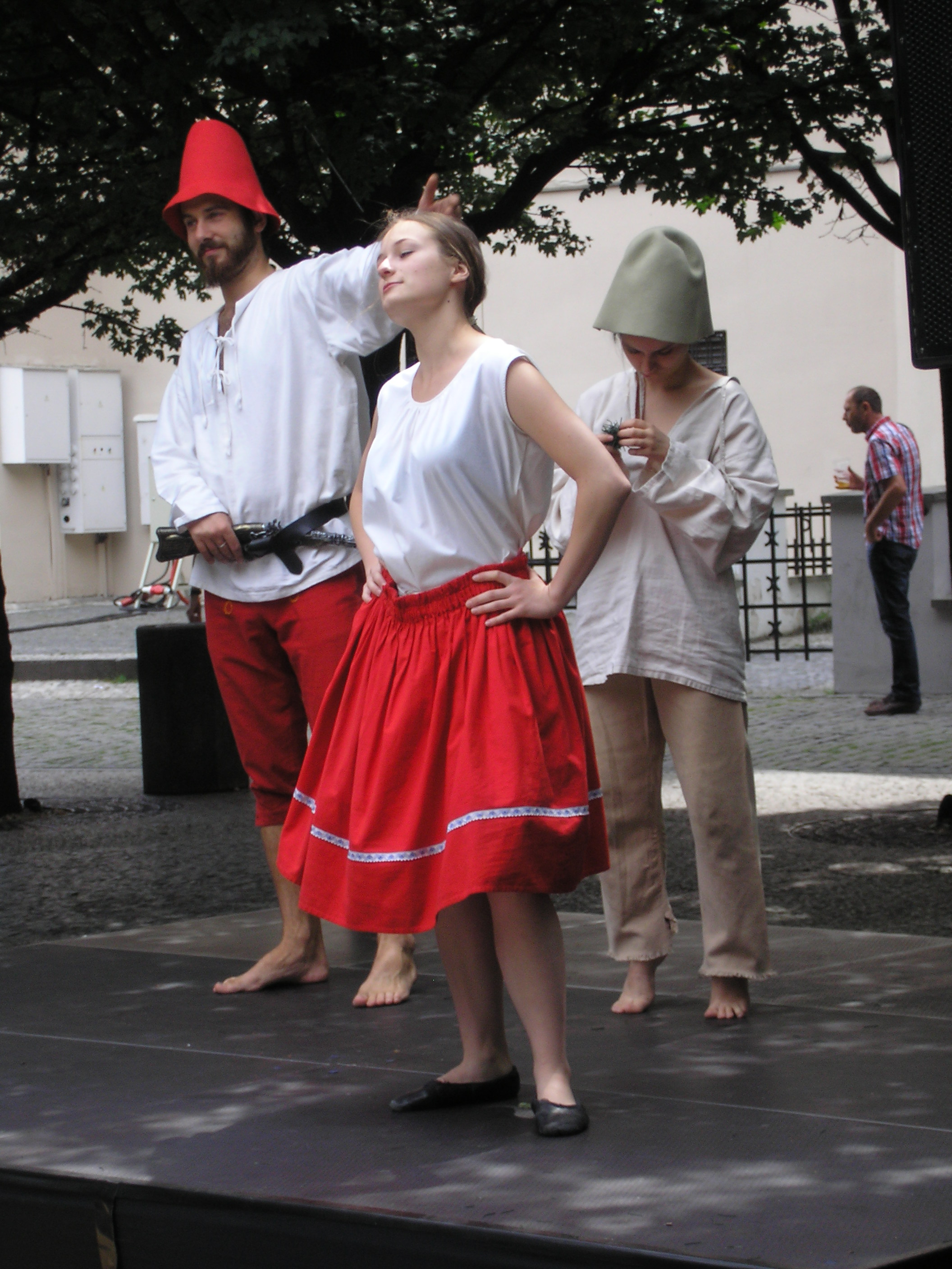 Herci ztvárňující v Praze na Staroměstském náměstí pohádku O loupežníku Rumcajsovi